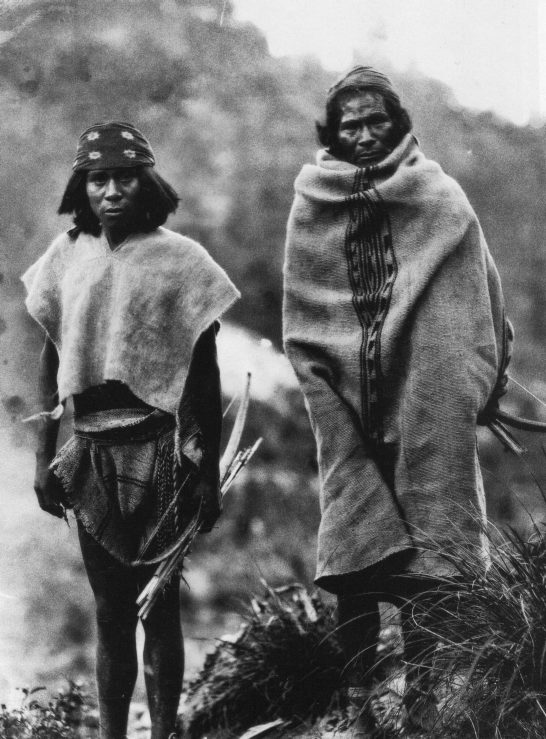 Dos varones tarahumaras, fotografiados en Tuaripa, Chihuahua, México